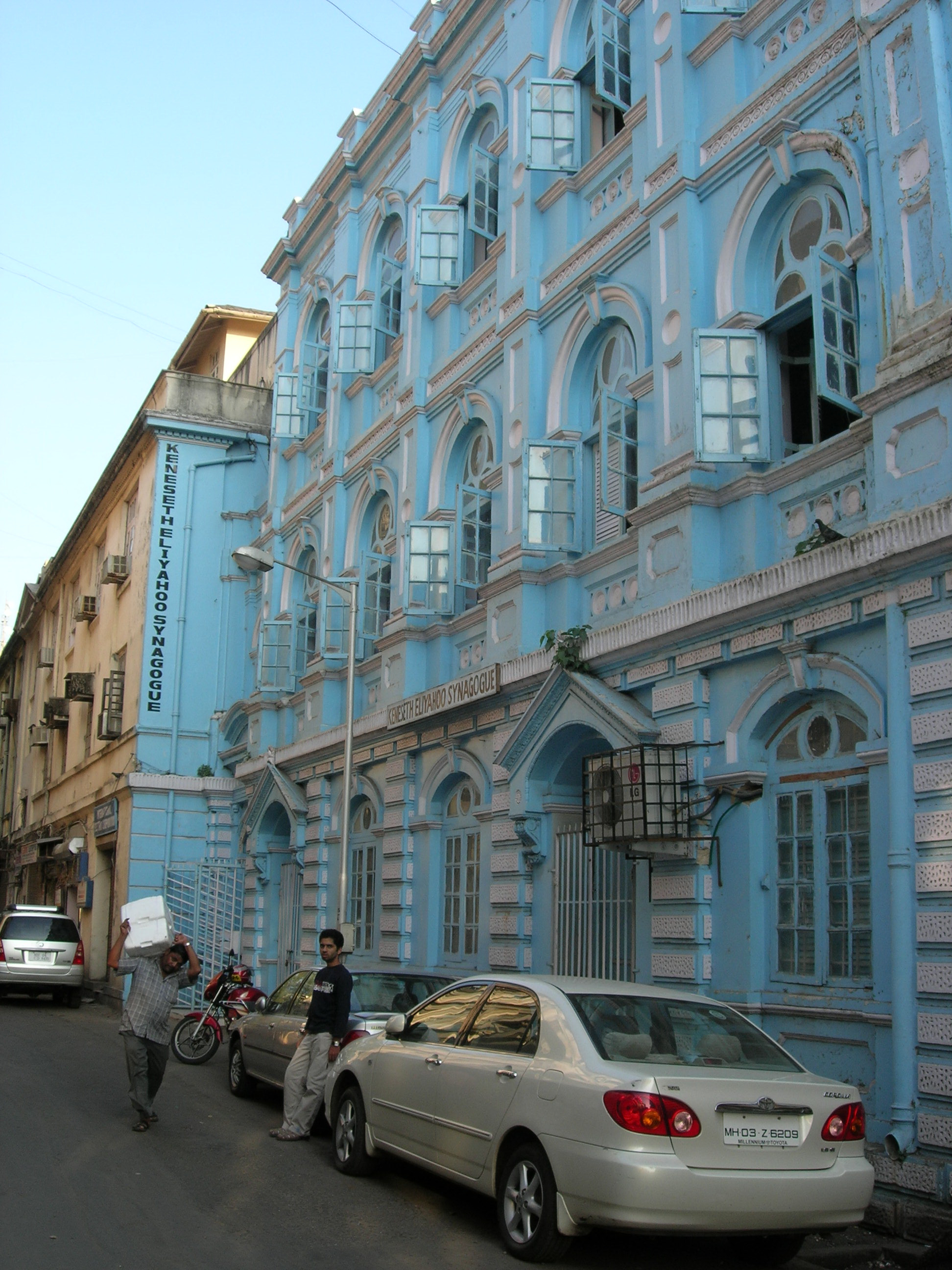 Kneset Eliyahoo Synagogue in Mumbai, India